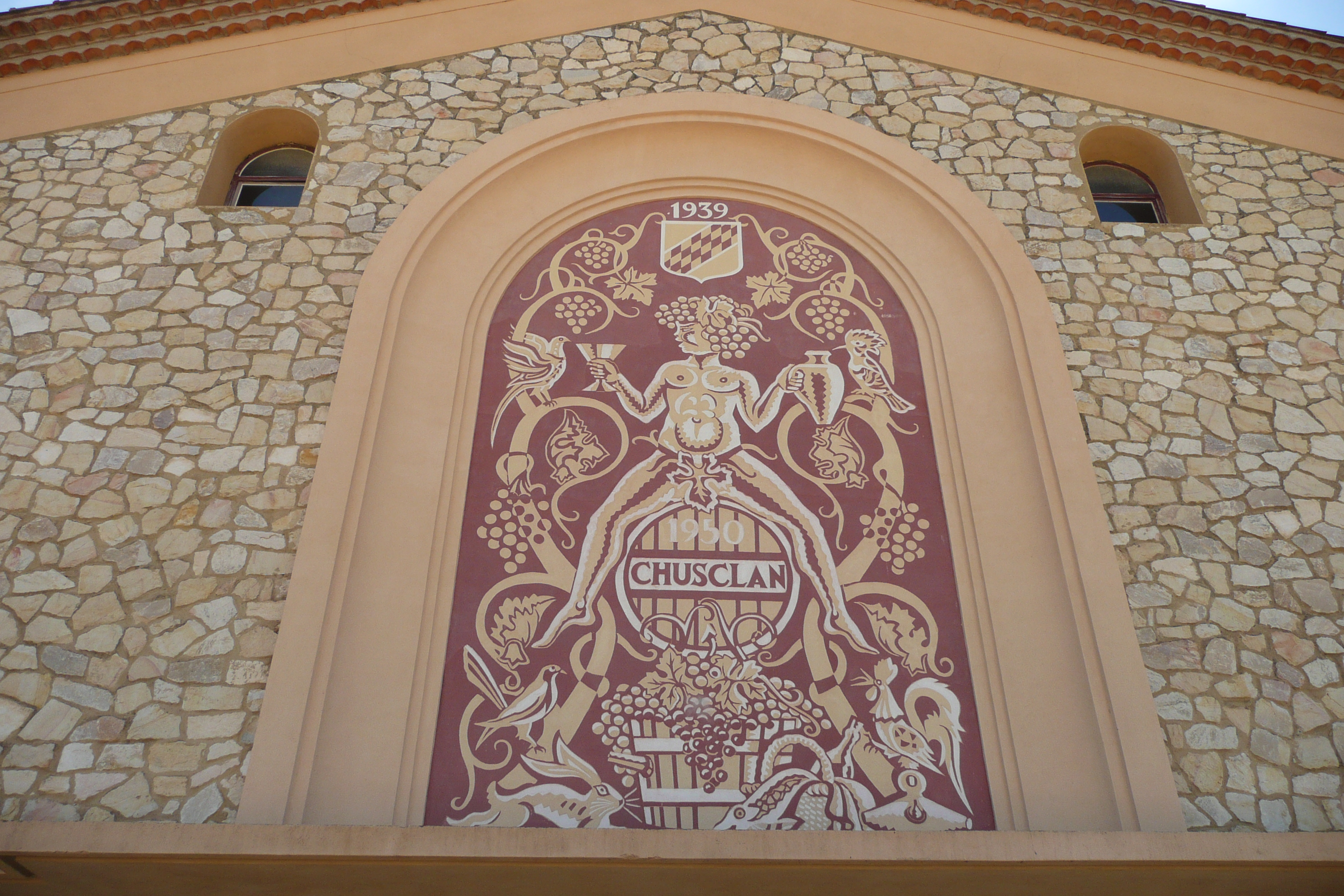 Chusclan.